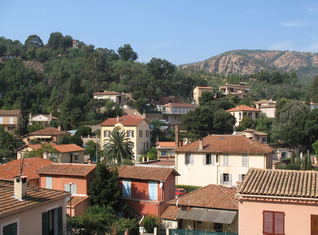 Théoule-sur-Mer